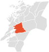 Map of Steinkjer, Nord-Trøndelag, Norway.